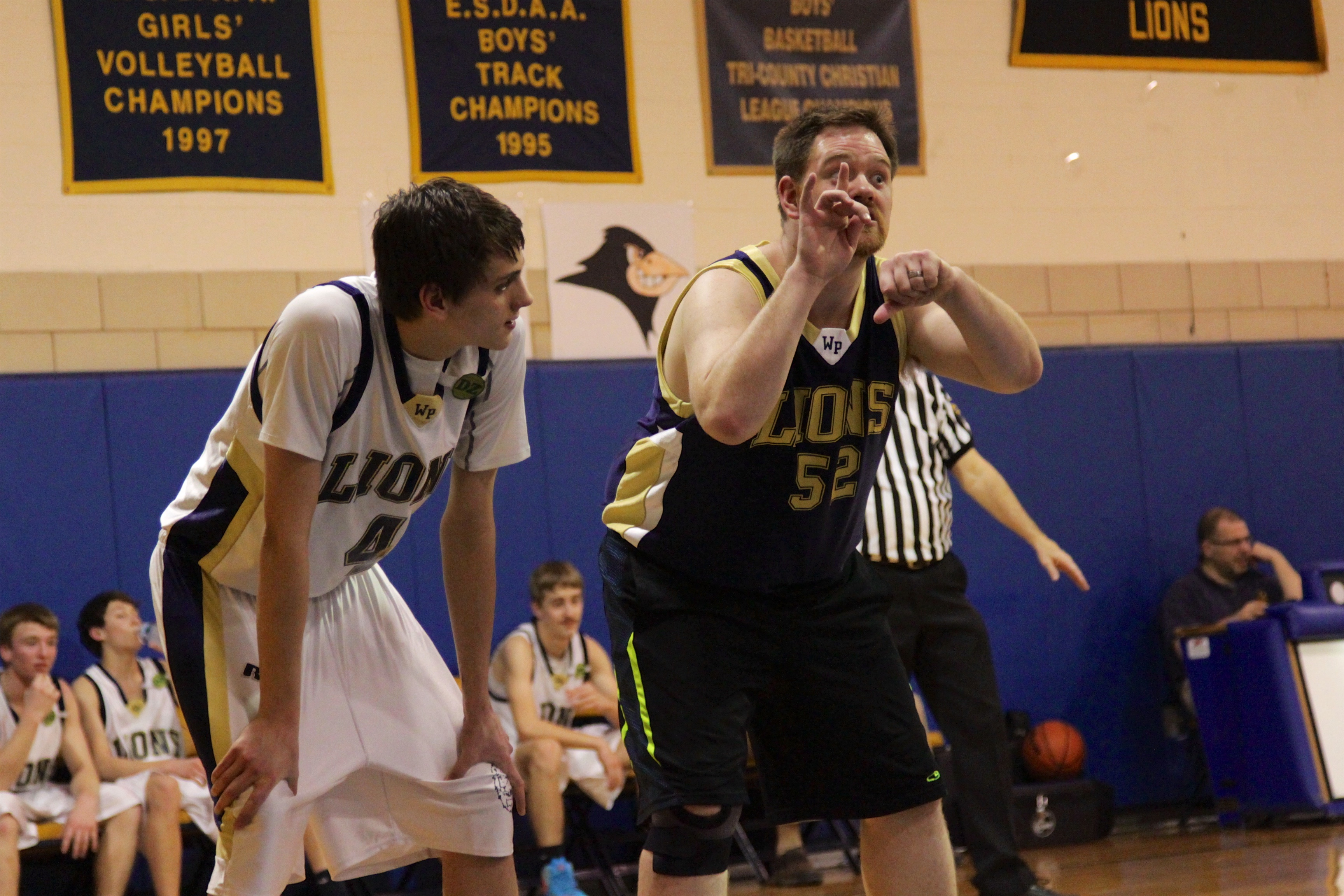 Gehörlose Sportler bei einem Basketballturnier, die während einer Spielunterbrechung in Gebärdensprache kommunizieren; hier bei einem Ehemaligen-Treffen in Edgewood nahe Pittsburgh in Pennsylvania, USA.